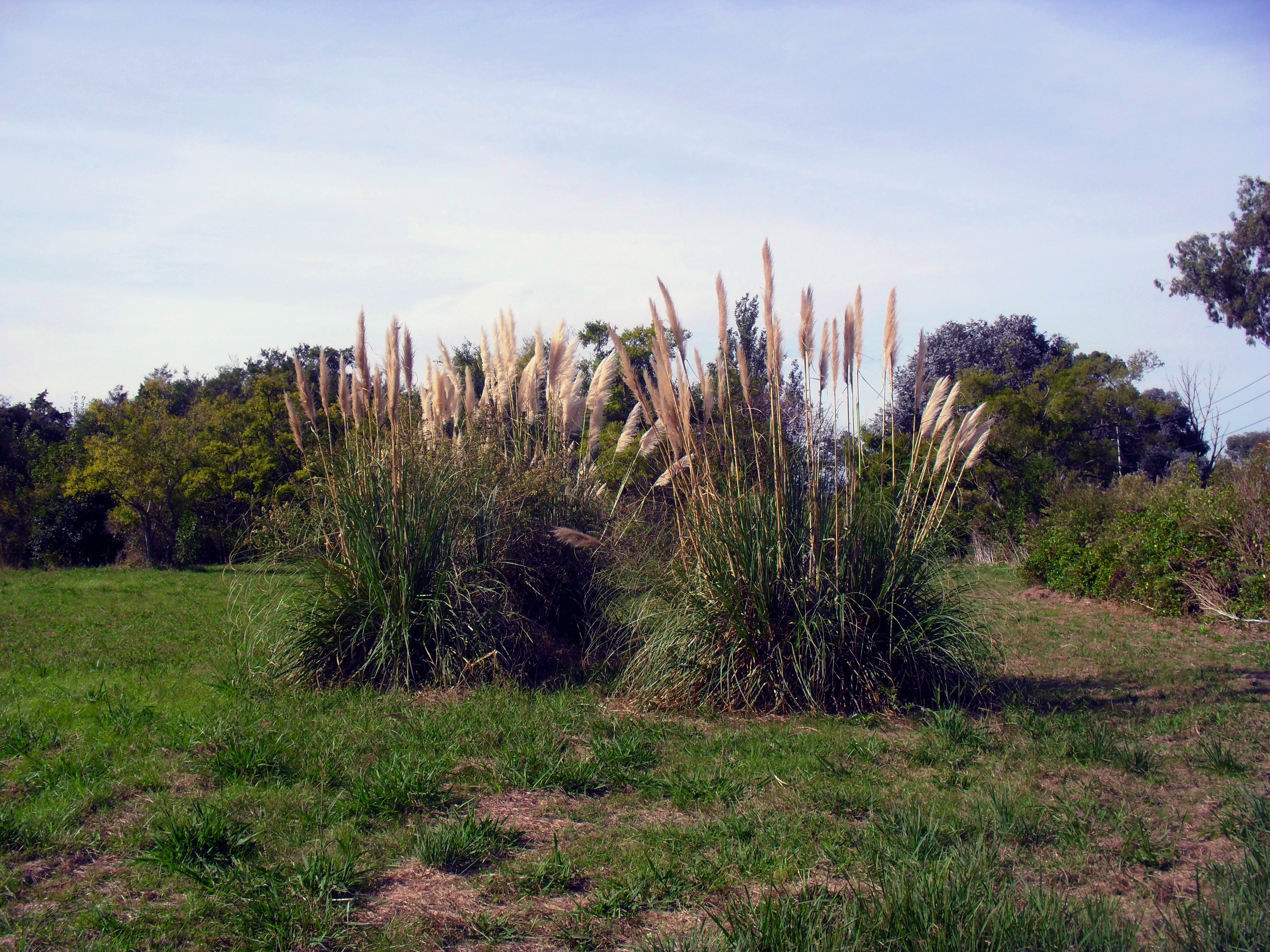 Museo histórico y Reserva Guillermo Hudson